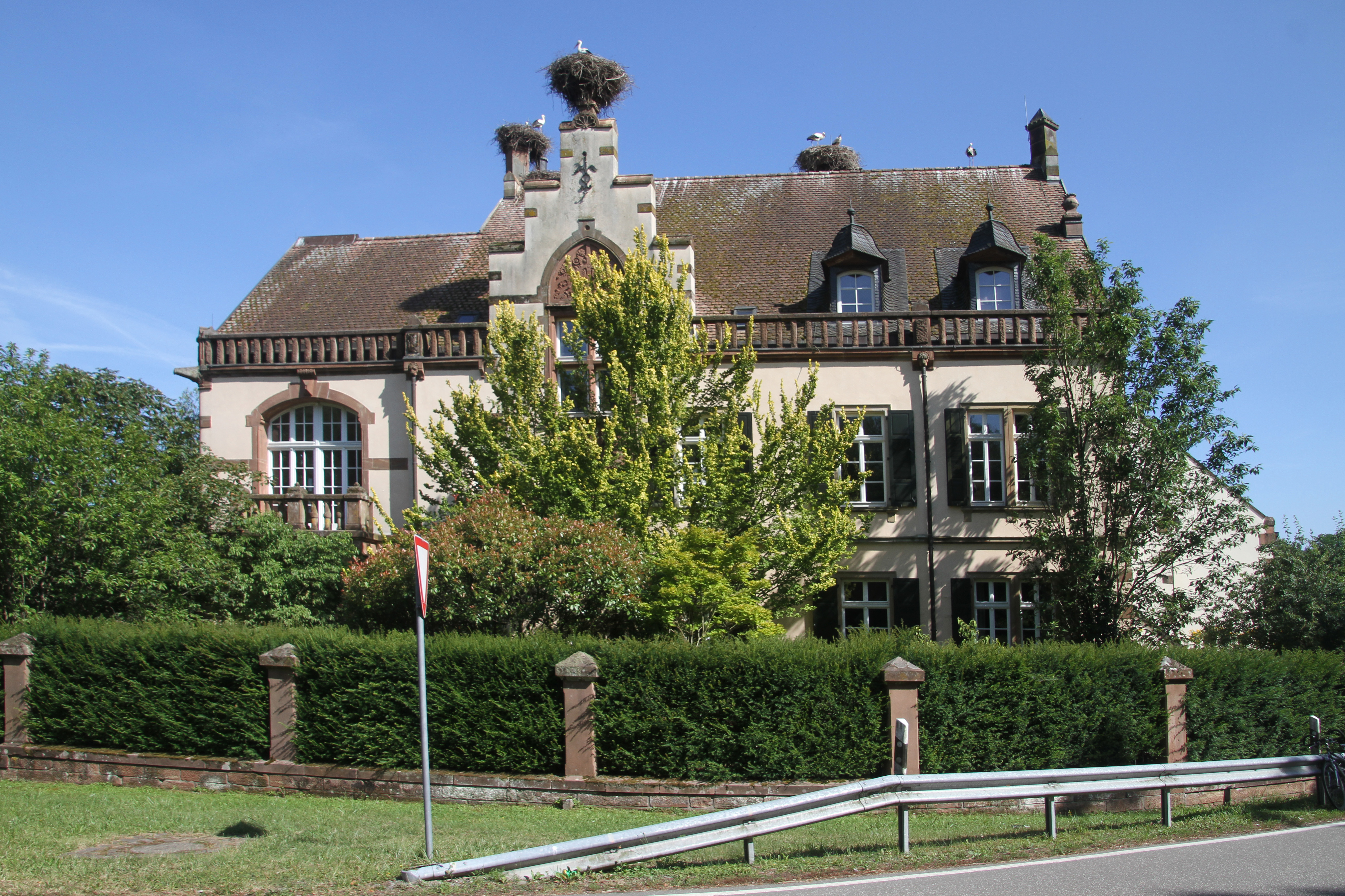 Kirschbacherhof (Dietrichingen)